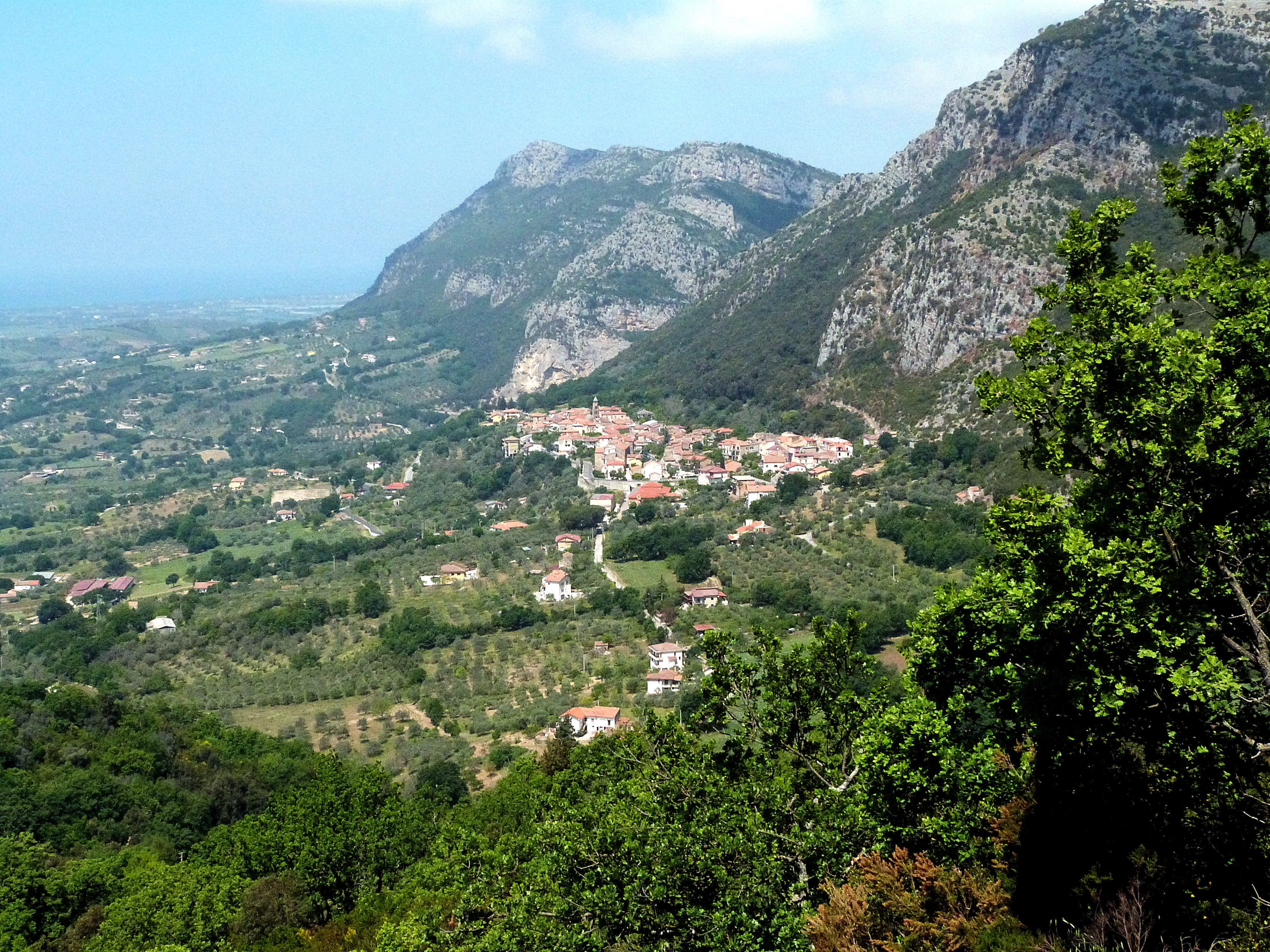 Giungano